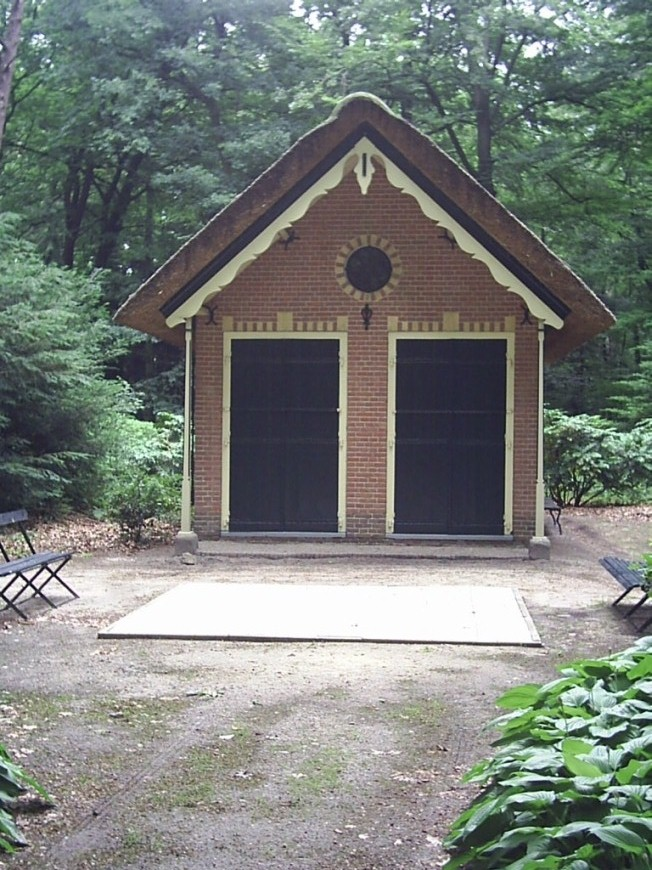 Prattenburg Zondagsschool